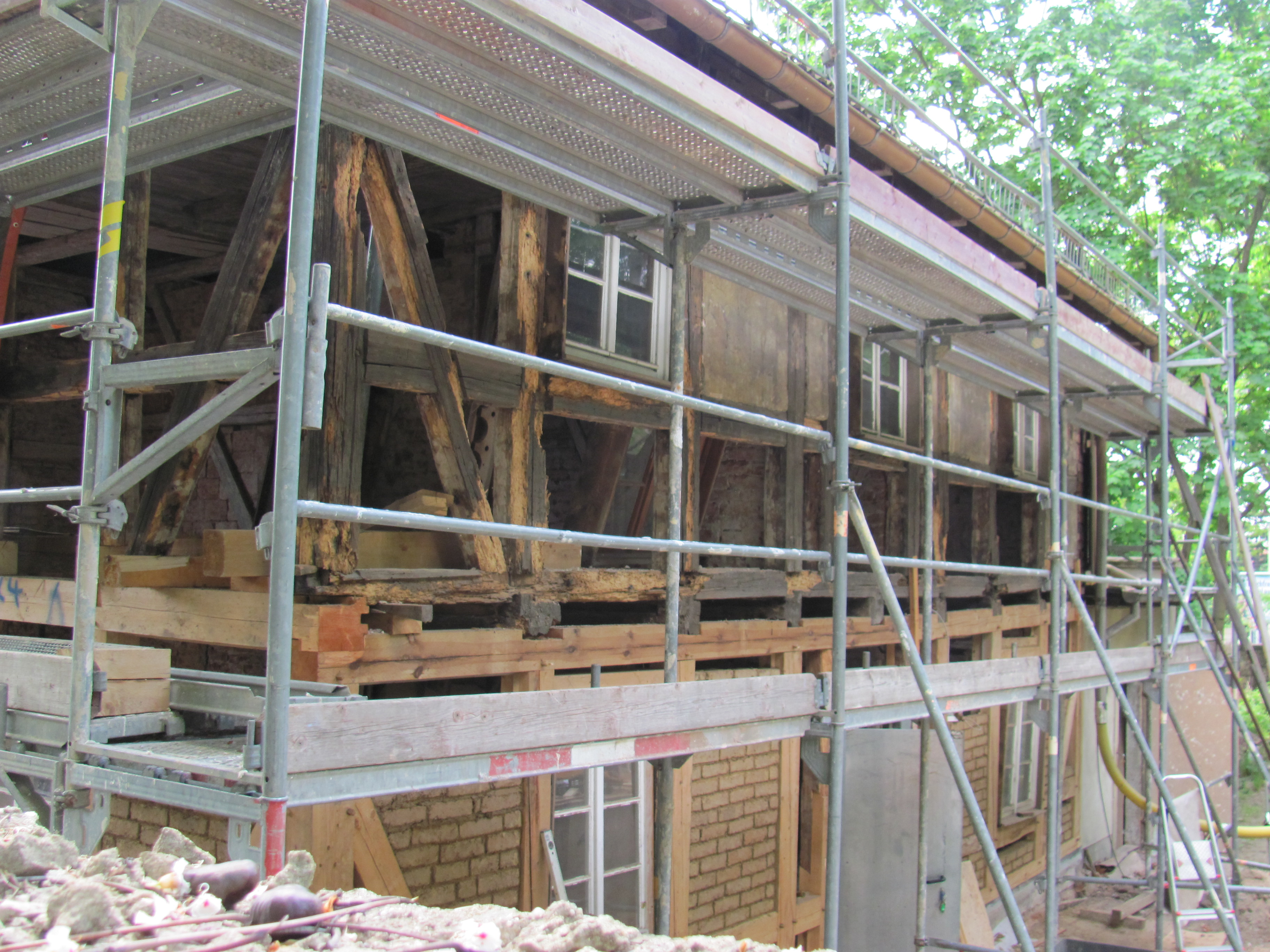 Radebeul Winzerhaus Meißner Straße 172